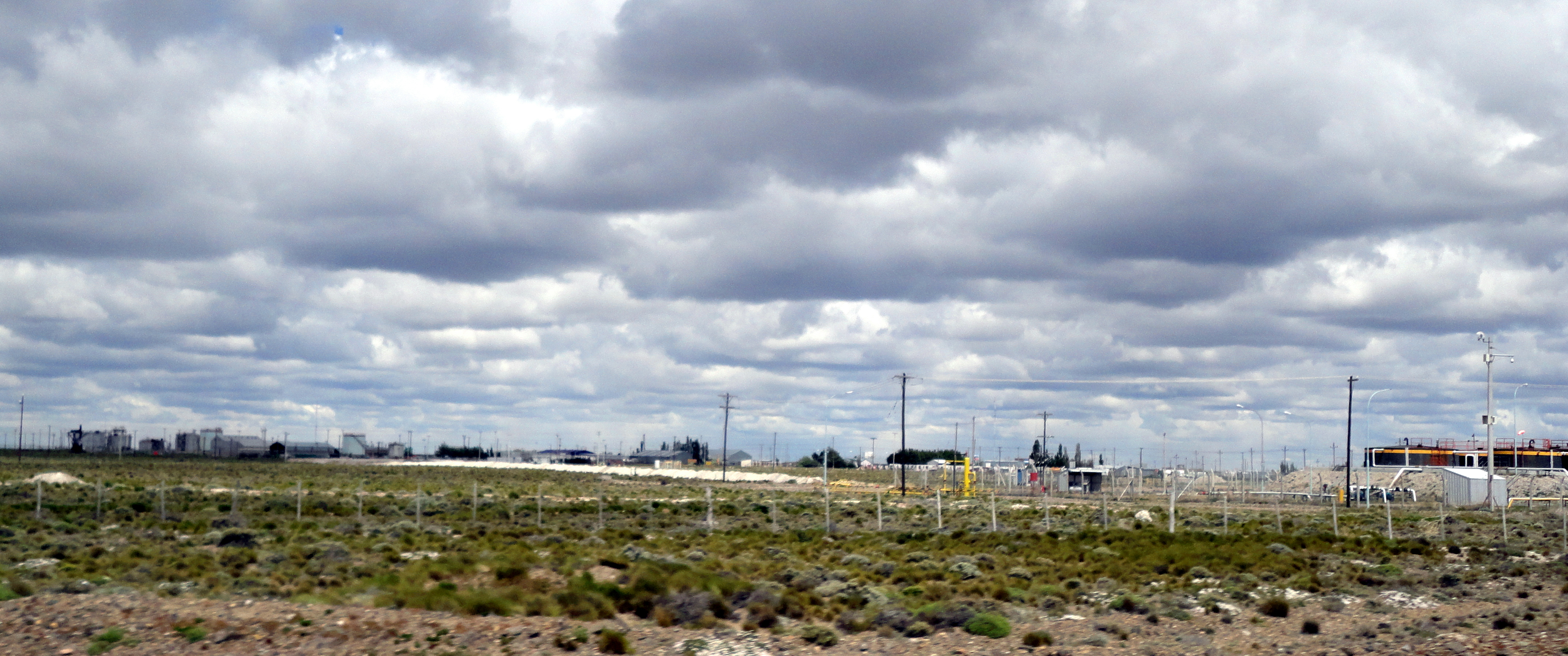 Vista actual de las intalaciones petroleras que rodean a la ex estación y la hacen parecer una simple casa más